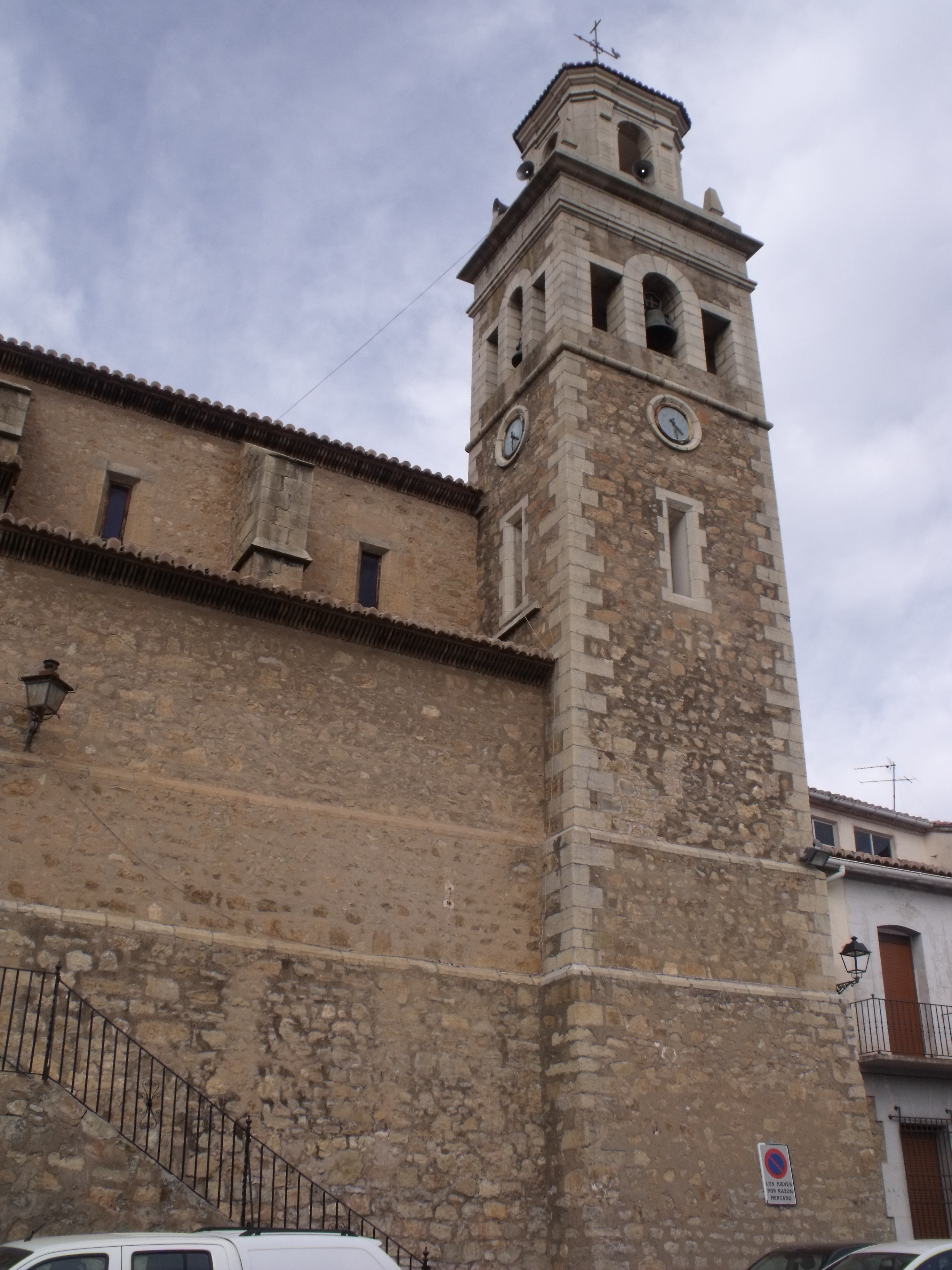 iglesia